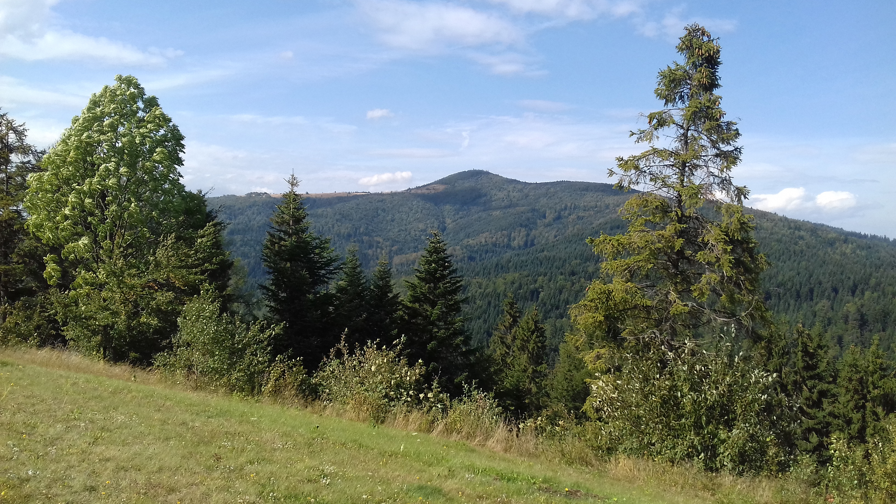 Mogielica